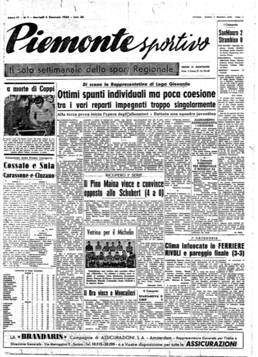 La prima pagina del Piemonte Sportivo del primo numero del 1960